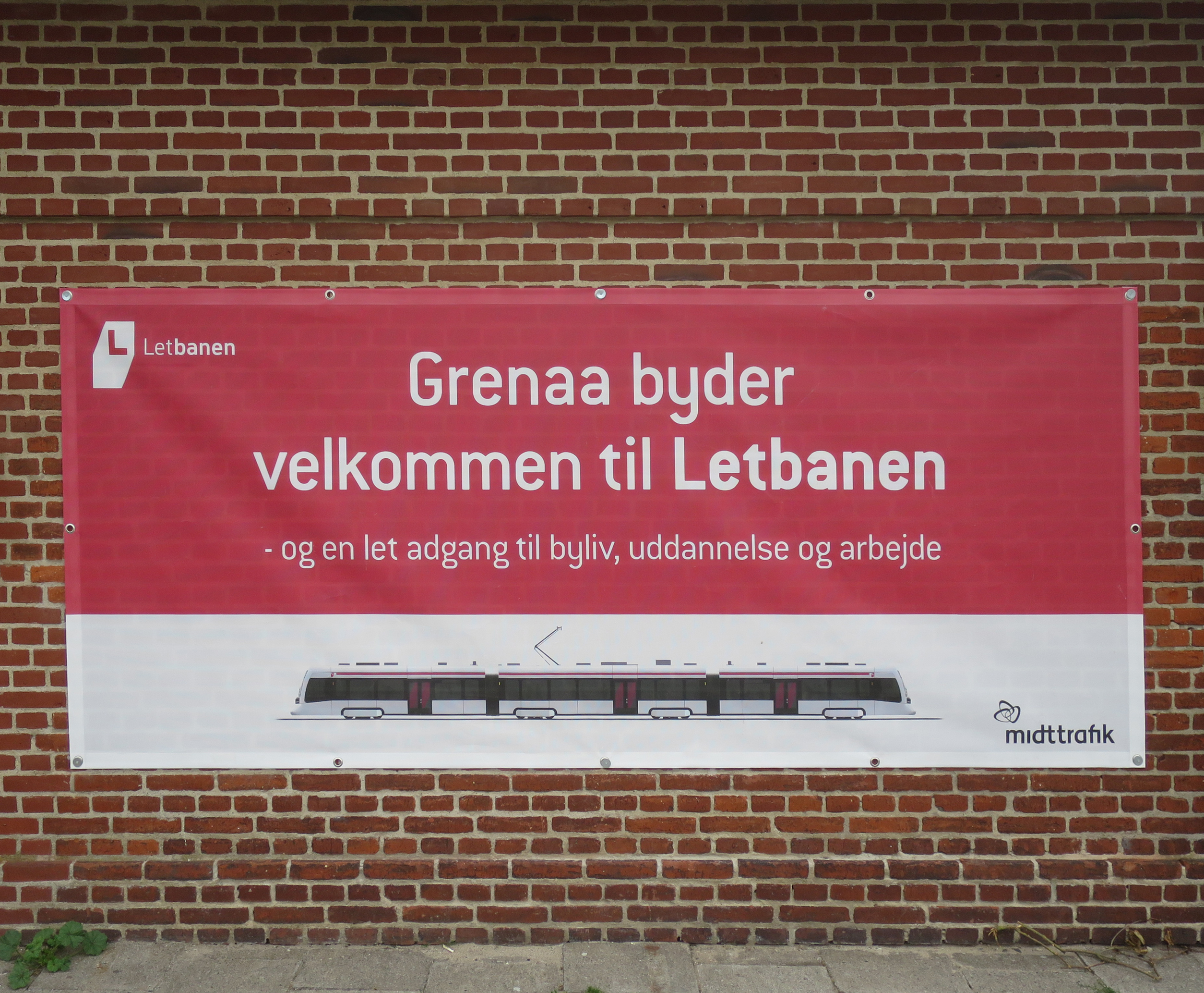 Begrüßung der Aarhus Letbane im Bahnhof Grenaa